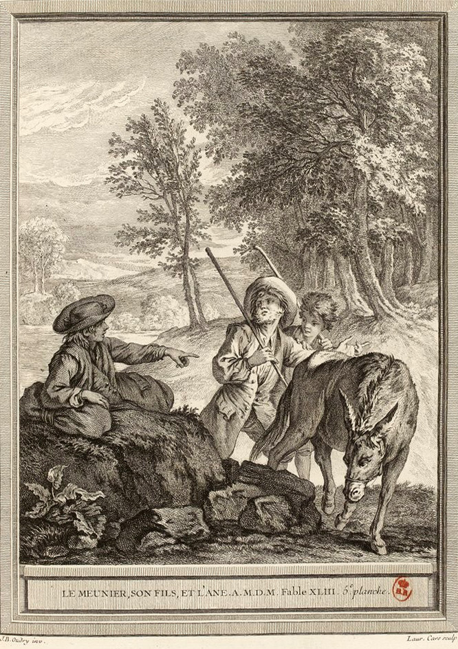 Gravure réalisée par Laurent Cars d'après un dessin de Jean-Baptiste Oudry représentant la fable Le meunier, son fils et l'âne de Jean de La Fontaine (fable 1 du livre III). Cette gravure est parue dans l'édition complète des fables de La Fontaine, parue en quatre tomes chez l'éditeur Desaint & Saillant, rue saint Jean de Beauvais à Paris, 1755-1759.